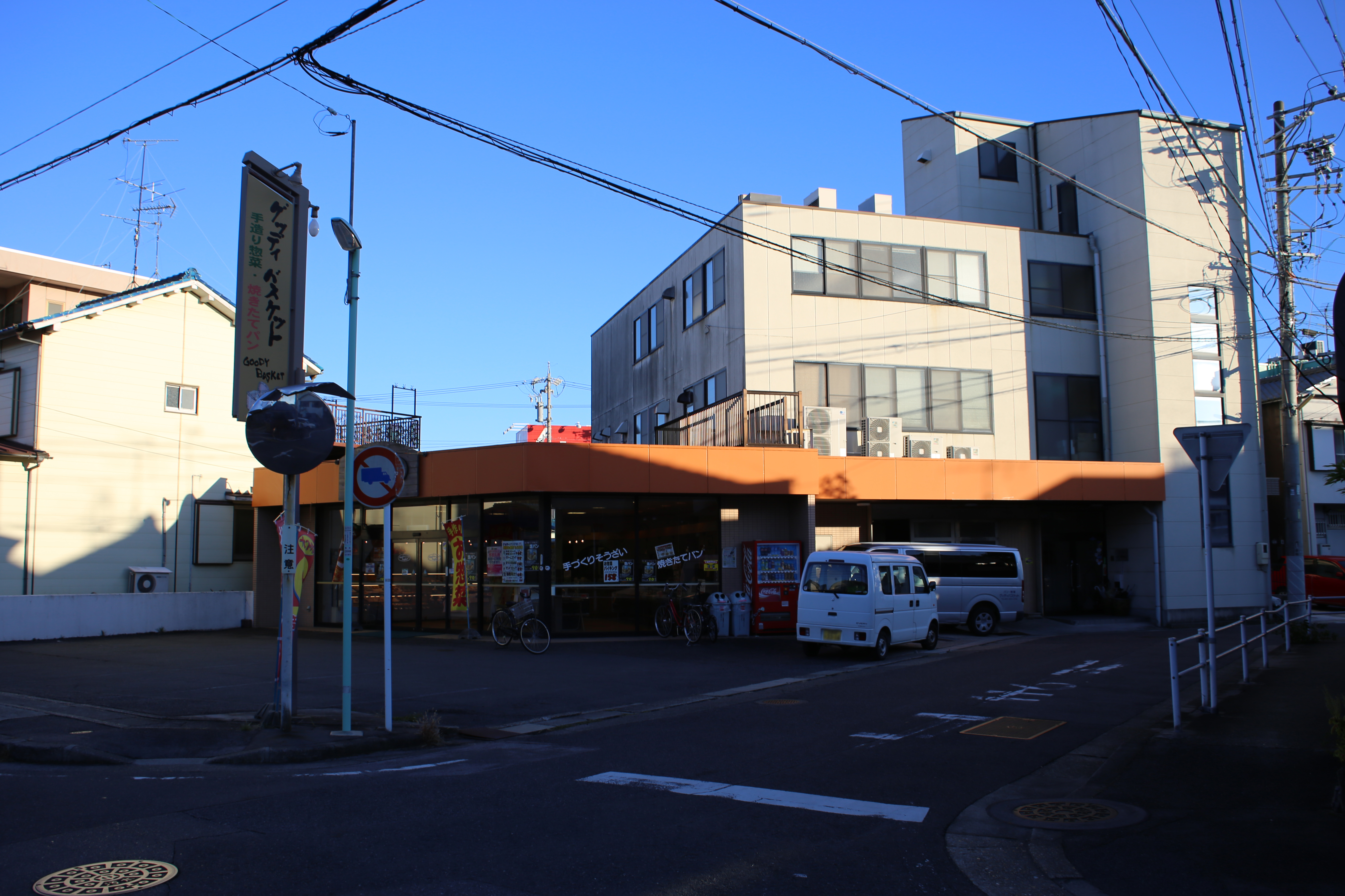 名古屋市緑区六田のヤマダイ本社を北側公道西側より撮影。ただし、ナンバープレートにつき画像処理済。